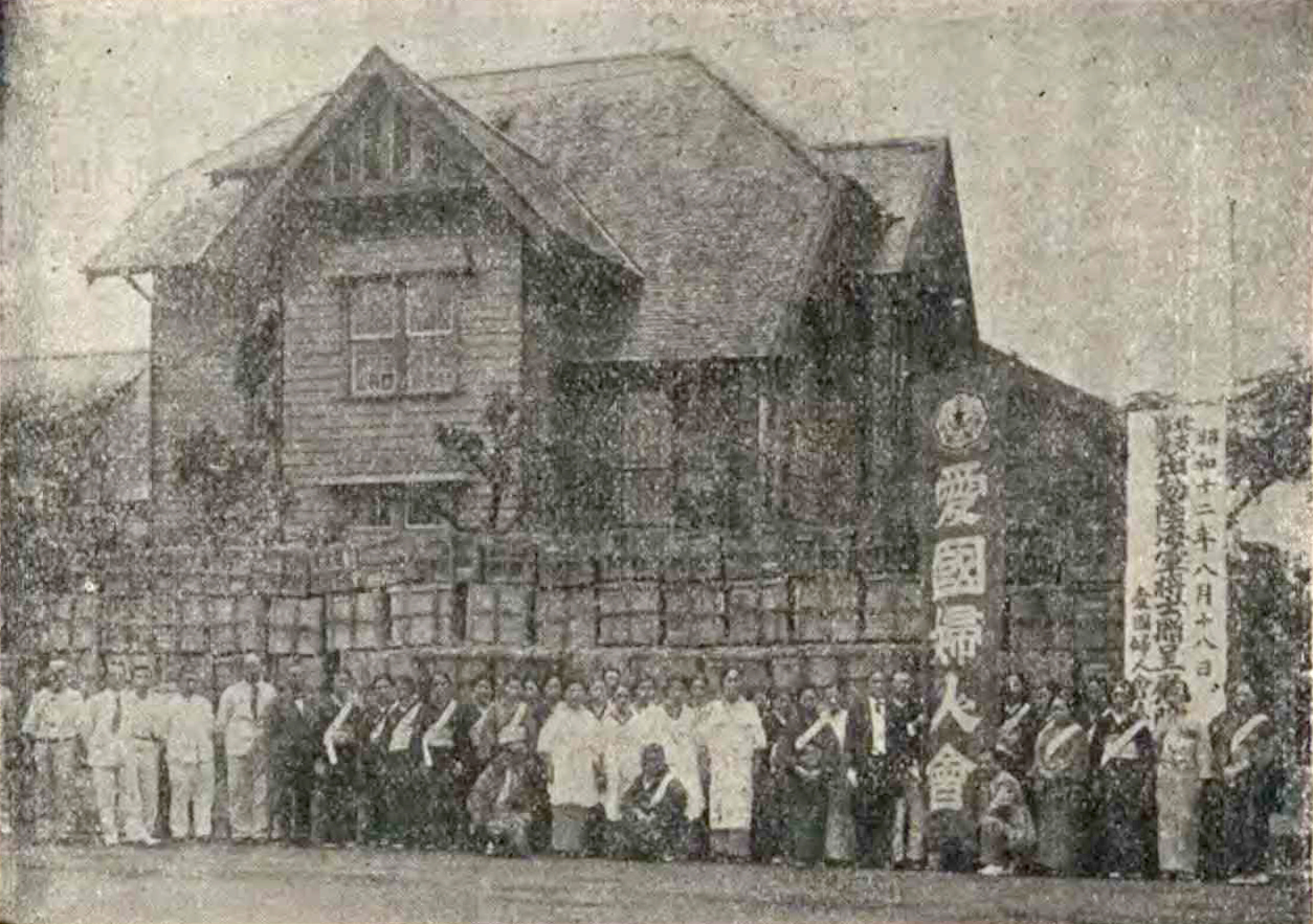 中文（台灣）: 愛國婦人會會員在台北市表町一丁目的愛國婦人會臺灣本部前發送軍人慰問袋之景象